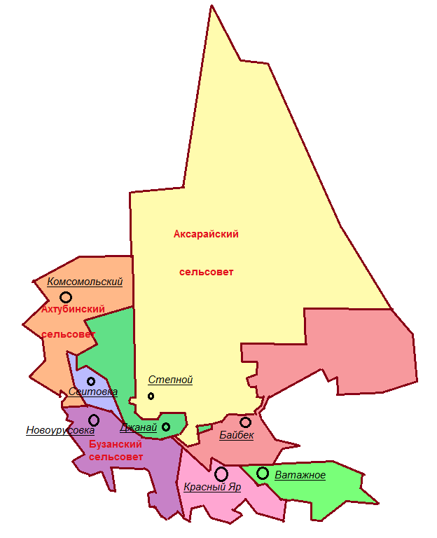 Сельсоветы Красноярского района Астраханской области (с 2018 года)